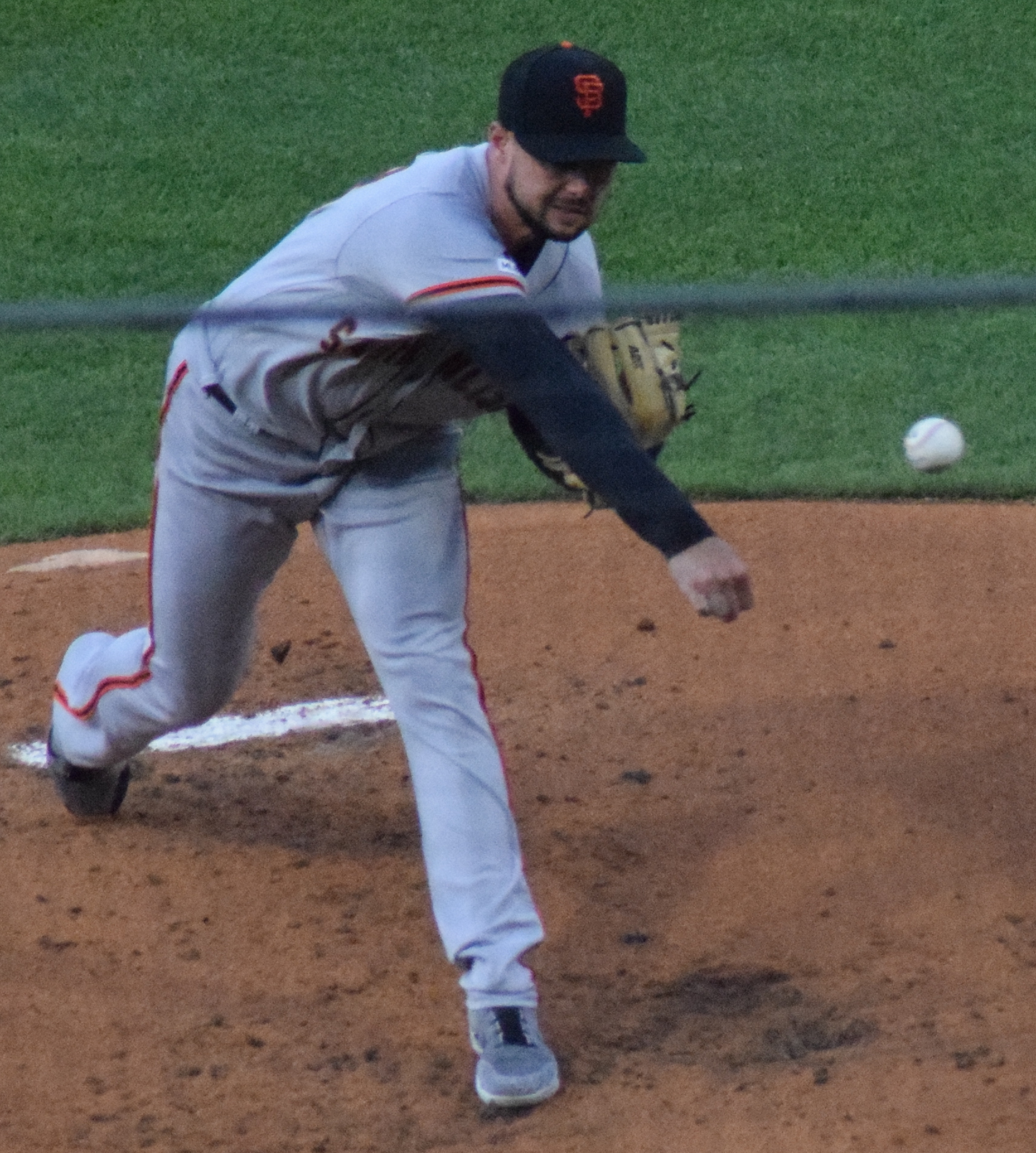 Tyler Beede